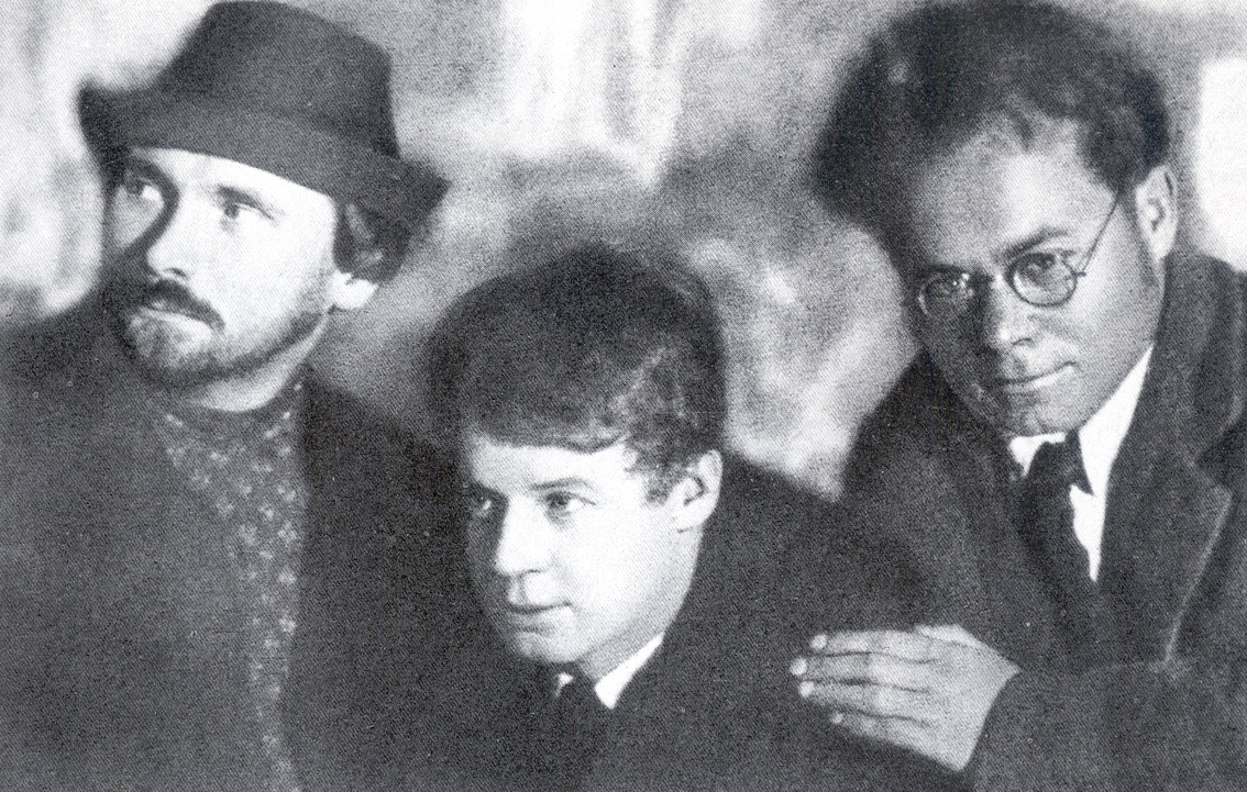 Николай Клюев, Сергей Есенин и Всеволод Иванов. Фотография. Петроград 1923 год